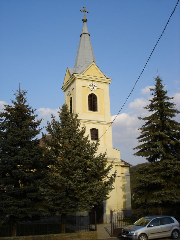 Nógrádmarcal római katolikus temploma, épült 1773-ban